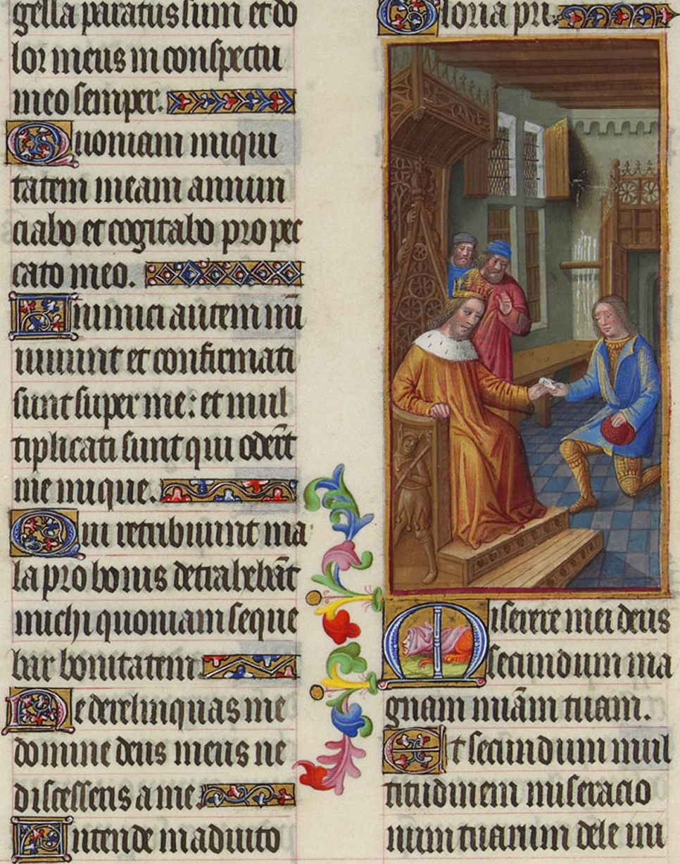 David sur son trône donne à Urie une lettre dans un intérieur du XVe siècle